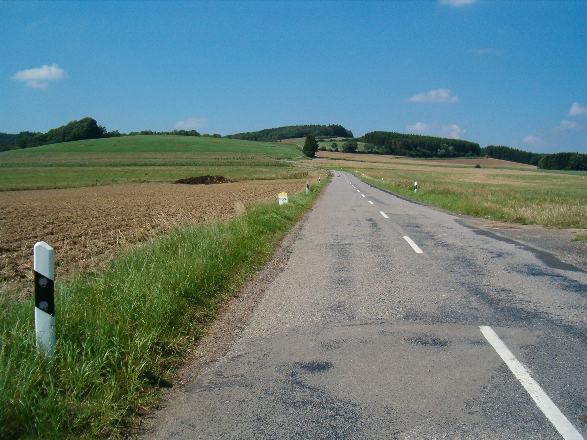 Hills in Luxembourg